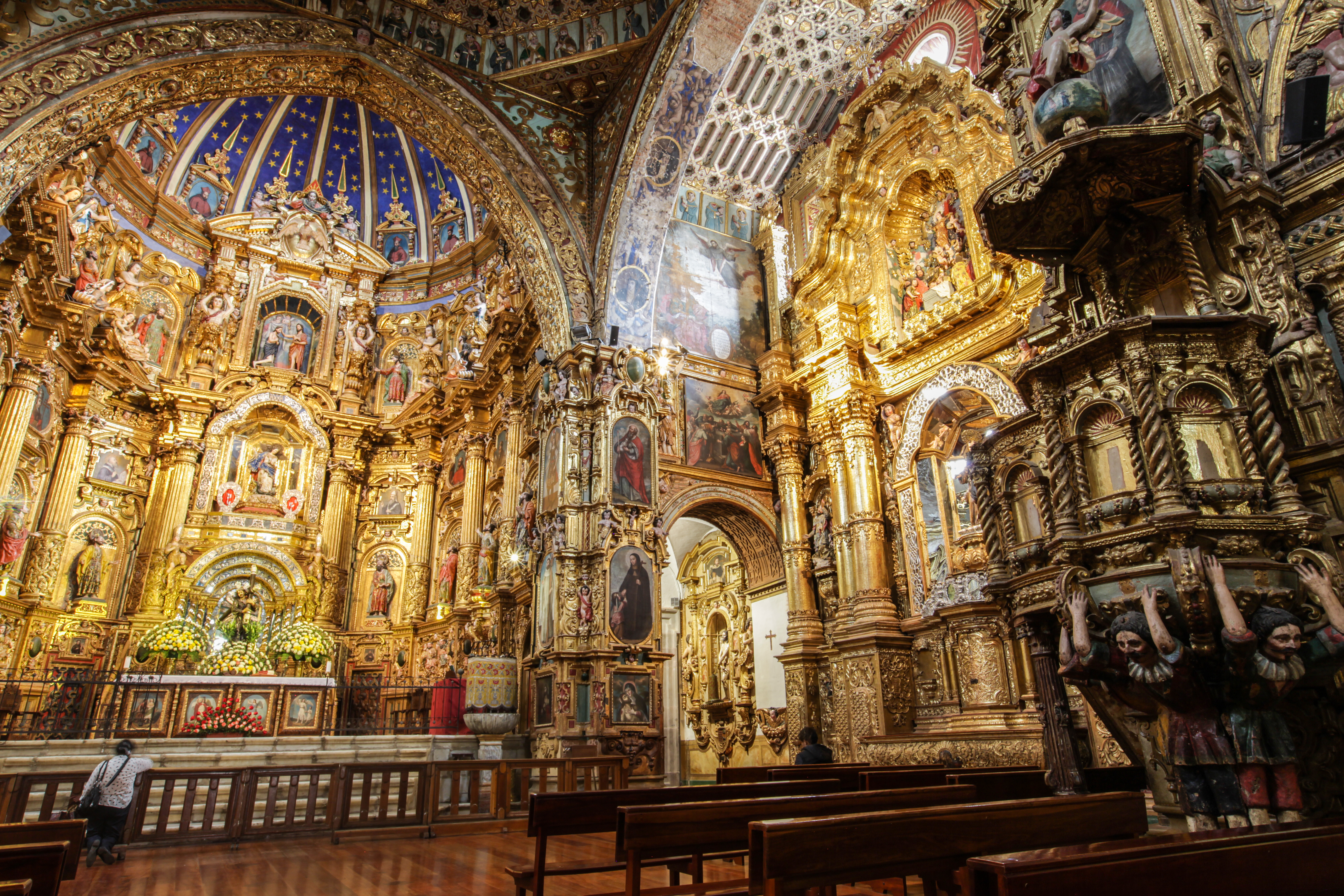 Iglesia San Francisco Quito